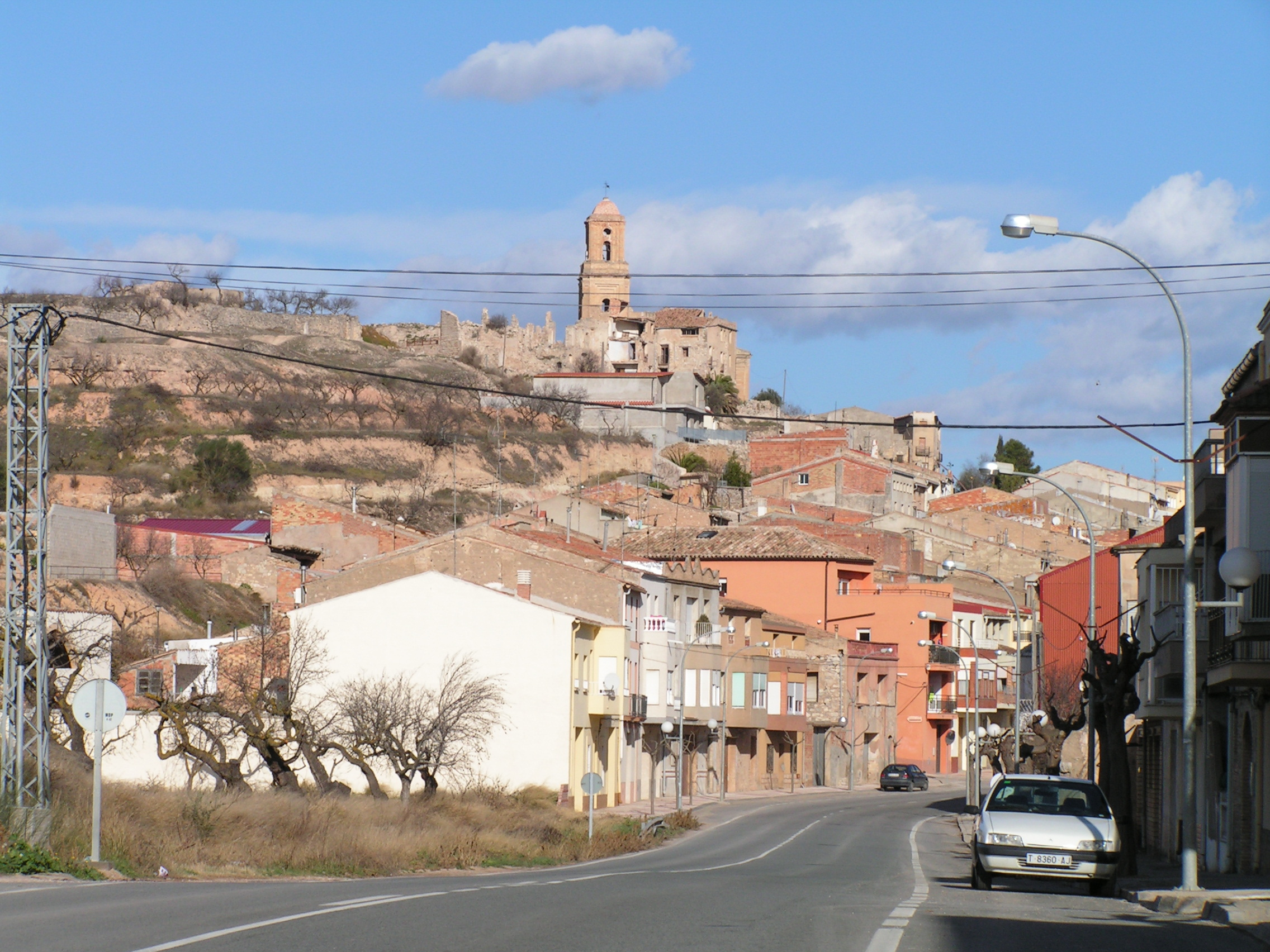 Corbera d'Ebre amb el Poble Vell a dalt